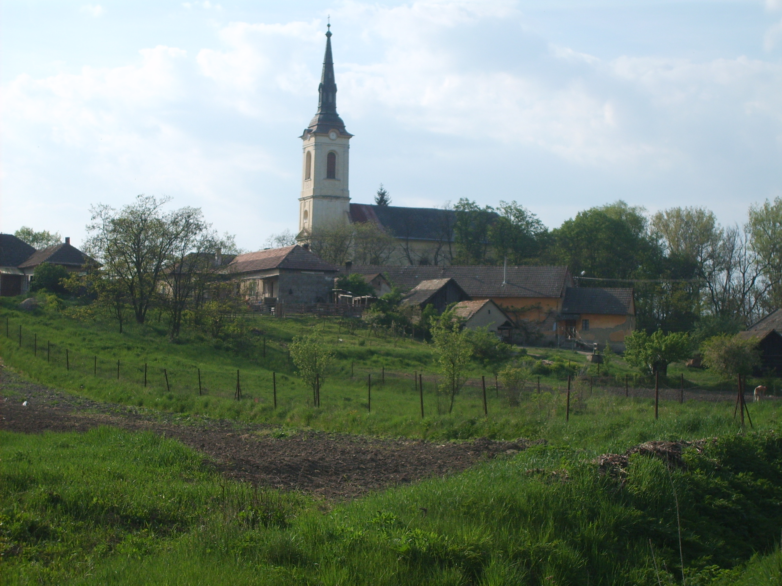 Velkenye látképe